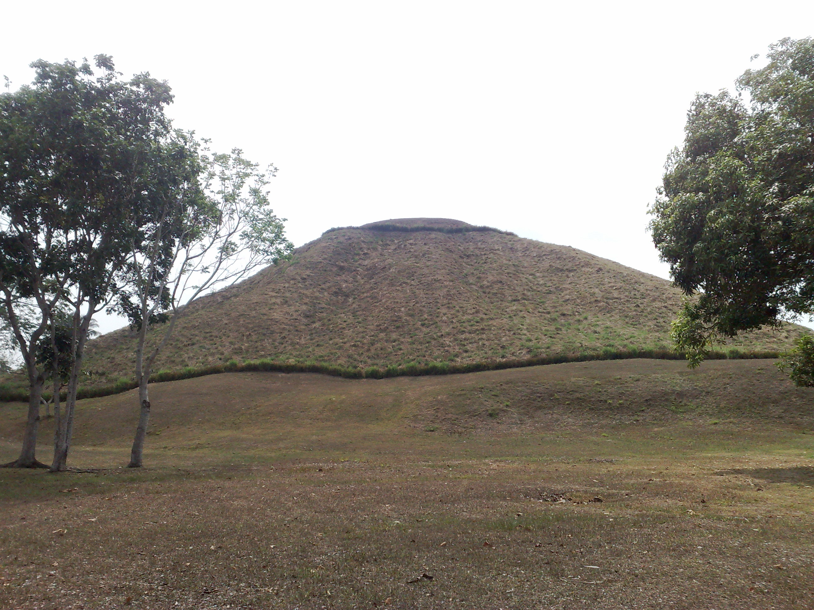 Cara poniente de la pirámide de La Venta (Olmec) — en Tabasco, México.